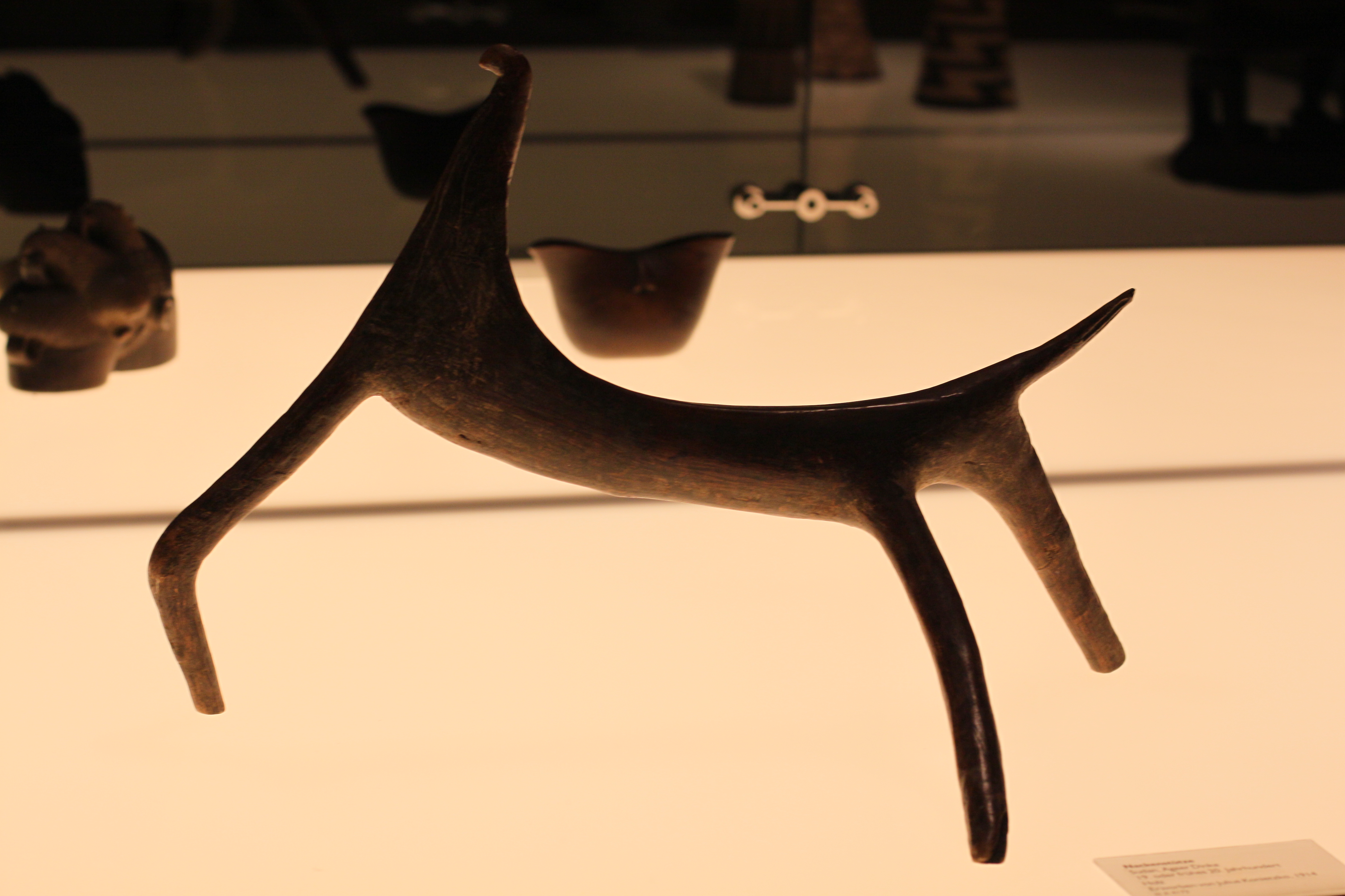 Nackenstütze, Sudan, Ageer Dinka; 19. oder frühes 20. Jh.; Holz; Afrikaabteilung, Ethnologisches Museum, Berlin, Inv. Nr. III A 4172 (erworben von Julius Konietzko, 1914)